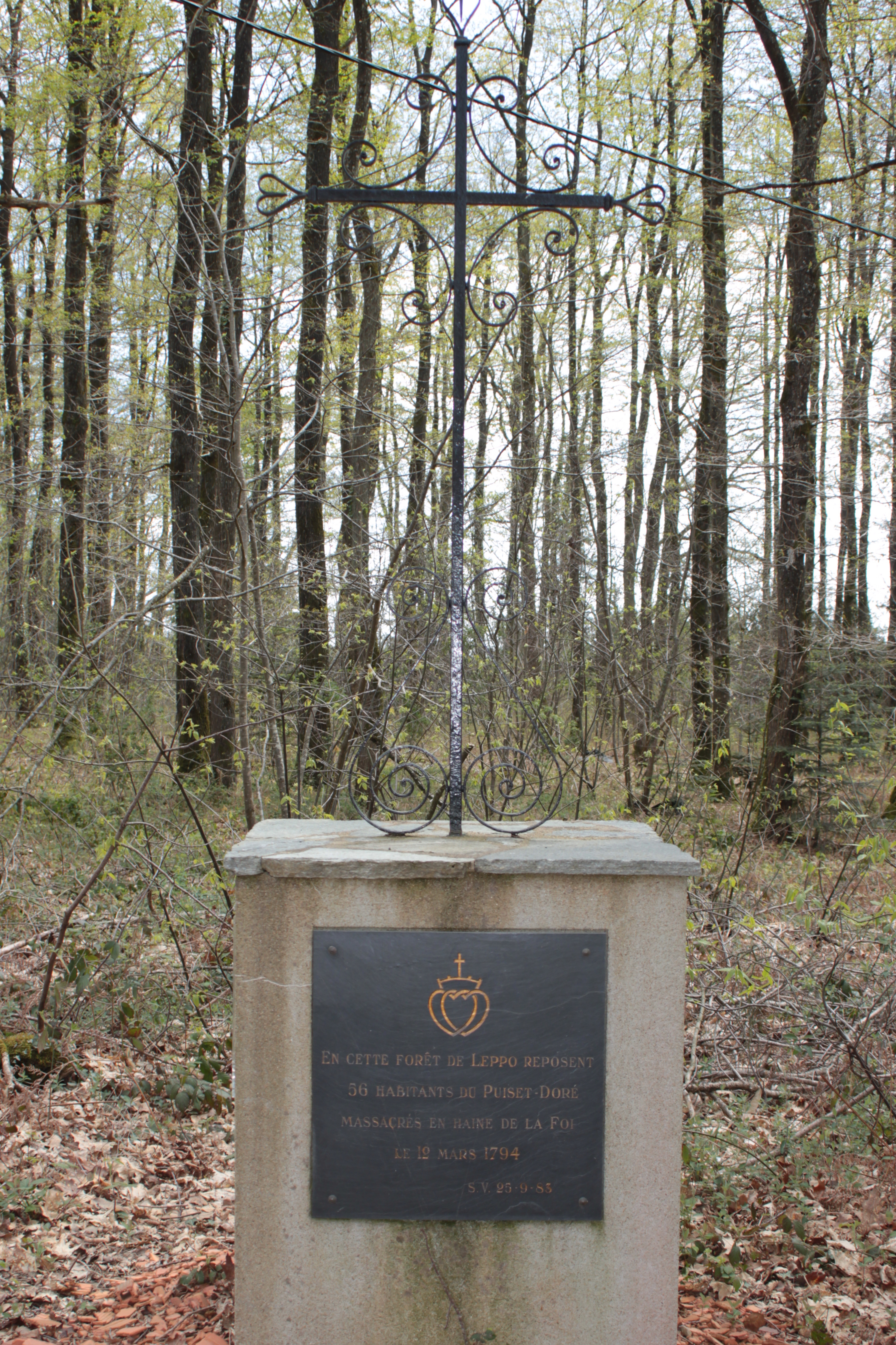 Croix en mémoire des 56 victimes puiset-doréennes des Colonnes infernales, 12 mars 1794, forêt de Leppo, Fr-49-le Fief-Sauvin.